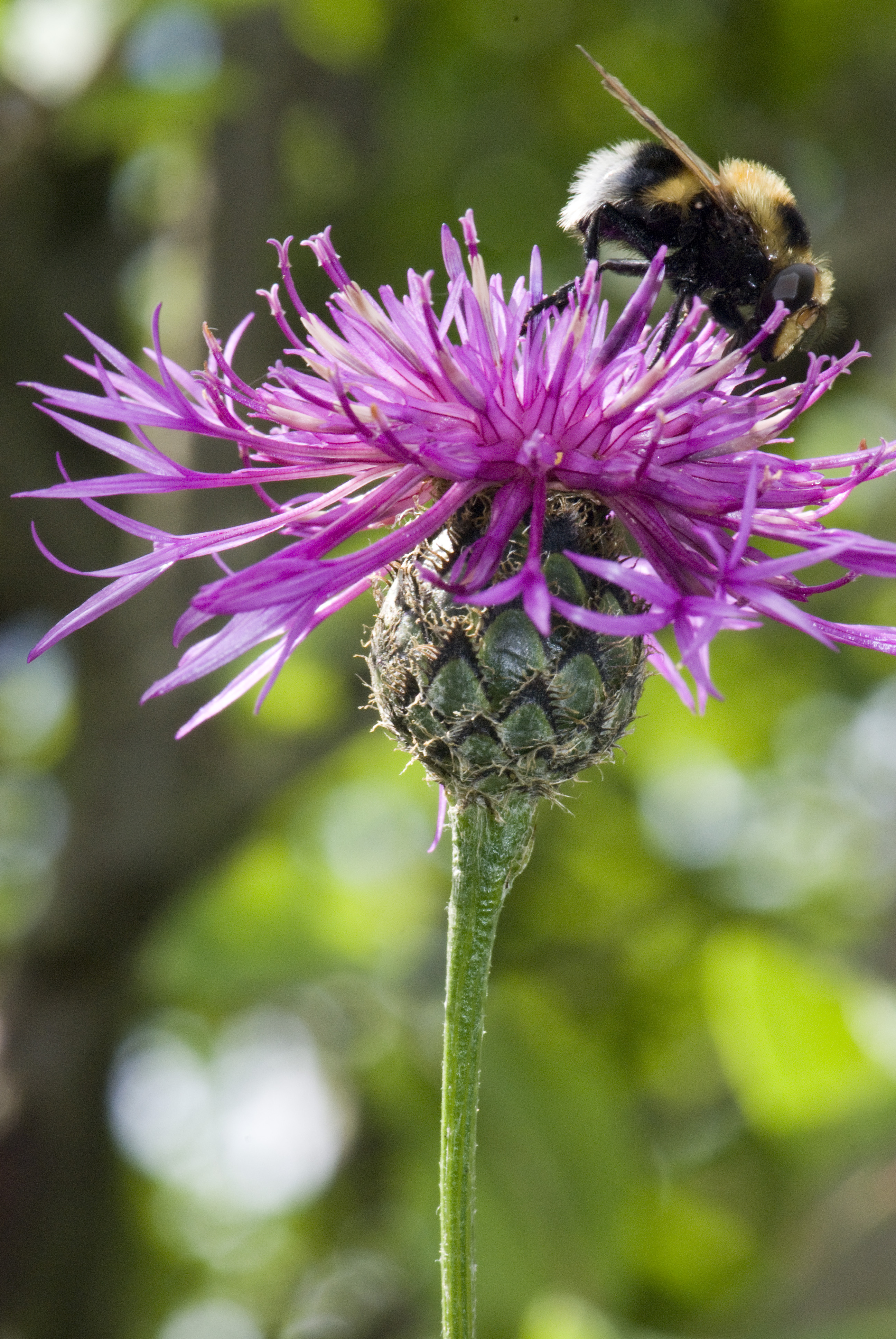 Centaurea scabiosa Coteau de Chartèves (Aisne), France